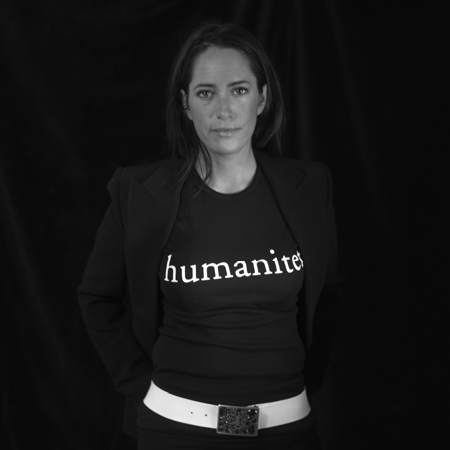 Soledad Piñero Misa är grundare av Diferencia och Retoy. Soledad Piñero Misa är grundare av Diferencia och Retoy.